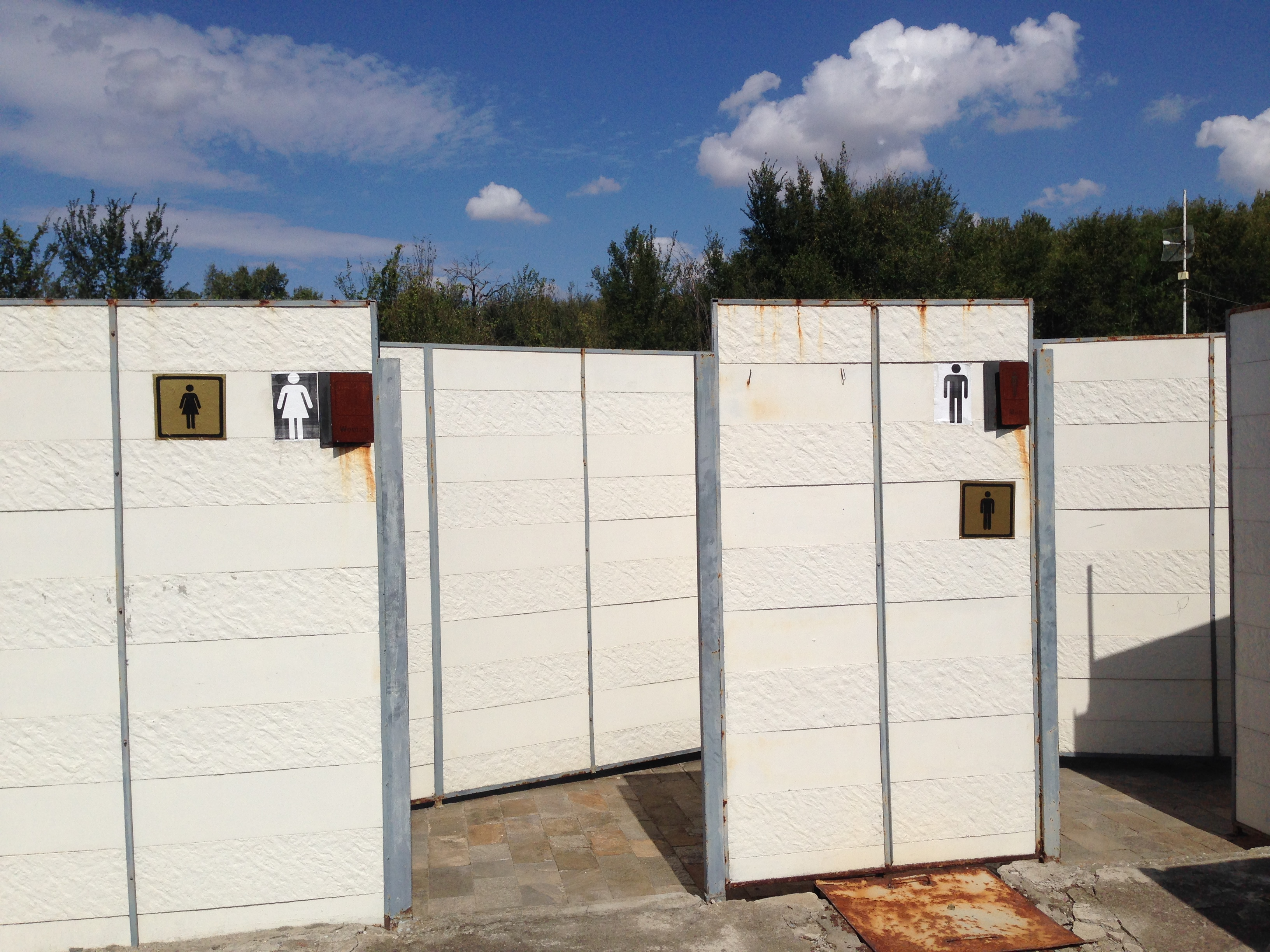 Вход на откритите басейни на минералната баня в с. Обединение